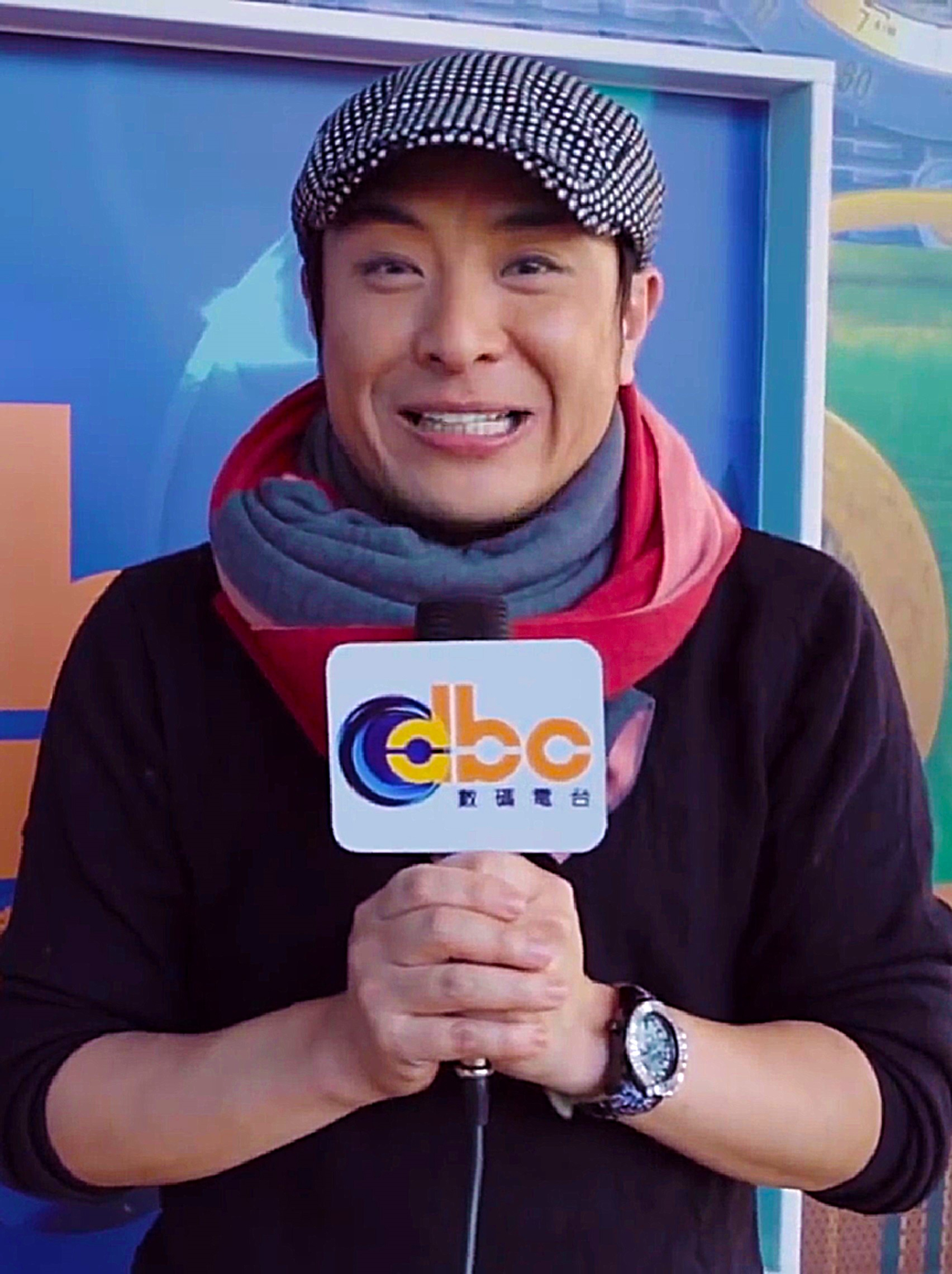 中文（香港）: 香港廣播主持人及演員，較為人熟知的是主持有線電視節目《怪談》與《怪談‧靈異直播》，並從事甜品生意